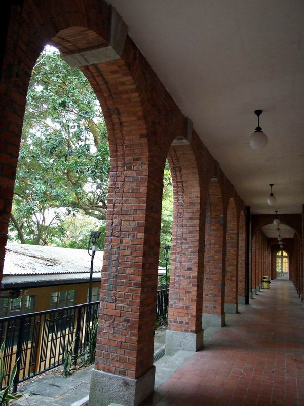 舊北區理民府南座游廊